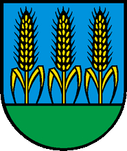 Wappen von Berzona Kanton Tessin